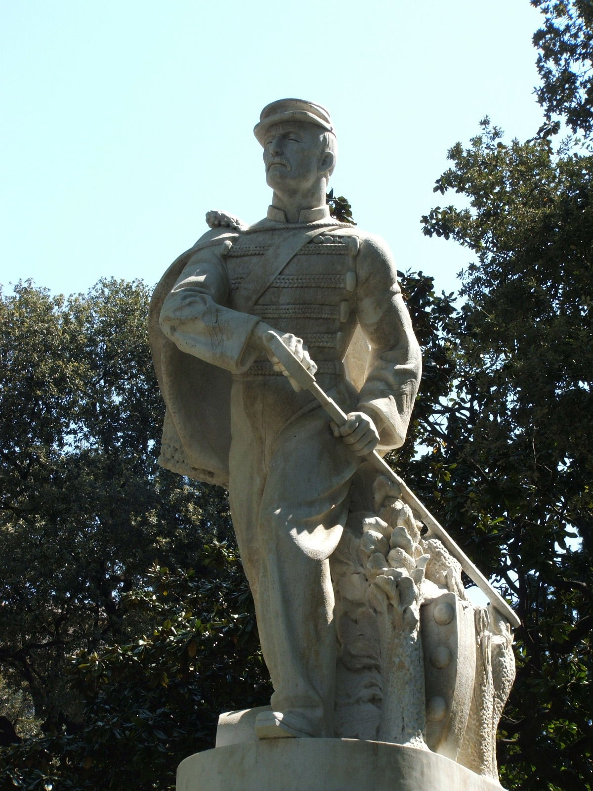 Genova, quartiere di Carignano, via Corsica - statua a Nino Bixio